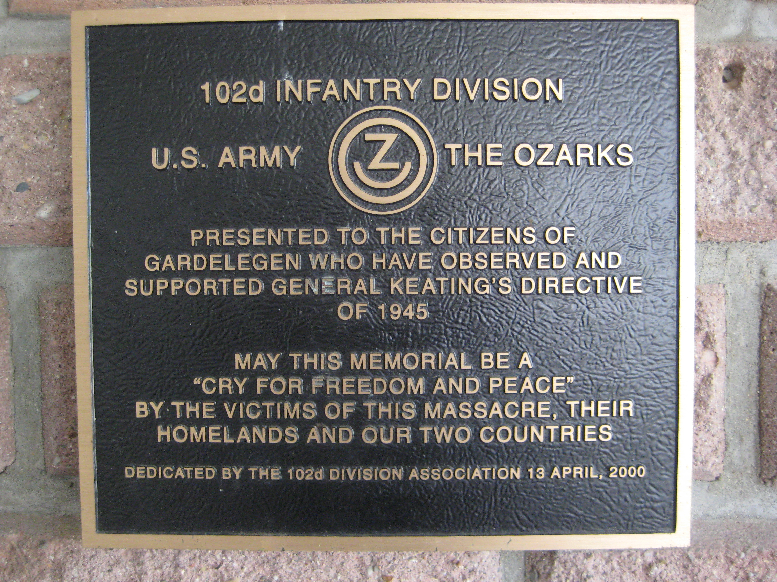 Memorial plaque